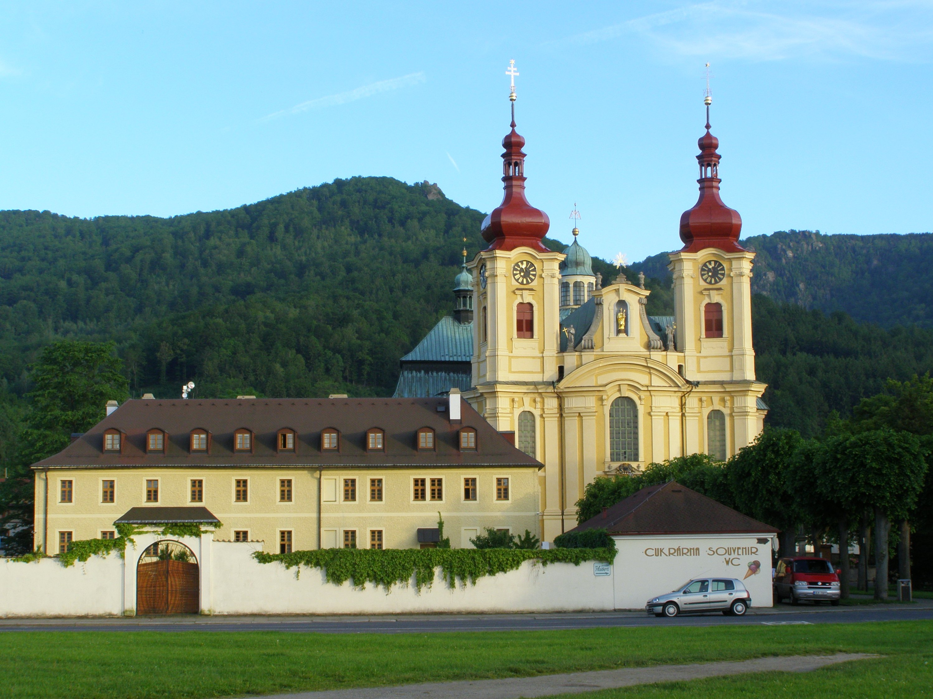 Hejnice, ulice Klášterní, Bazilika Navštívení Panny Marie a přilehlý klášter, v pozadí vrchol Ořešník